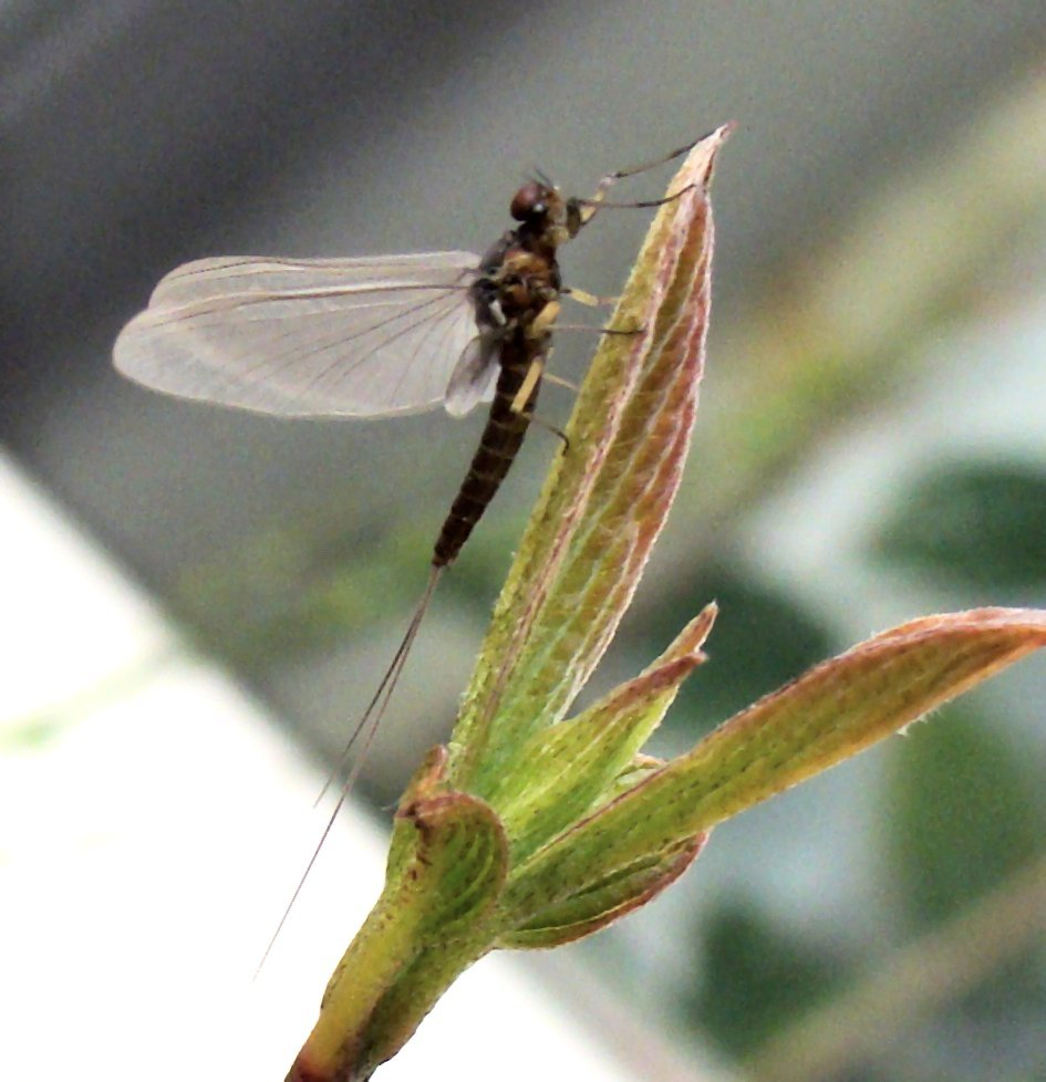 Ephemeridae